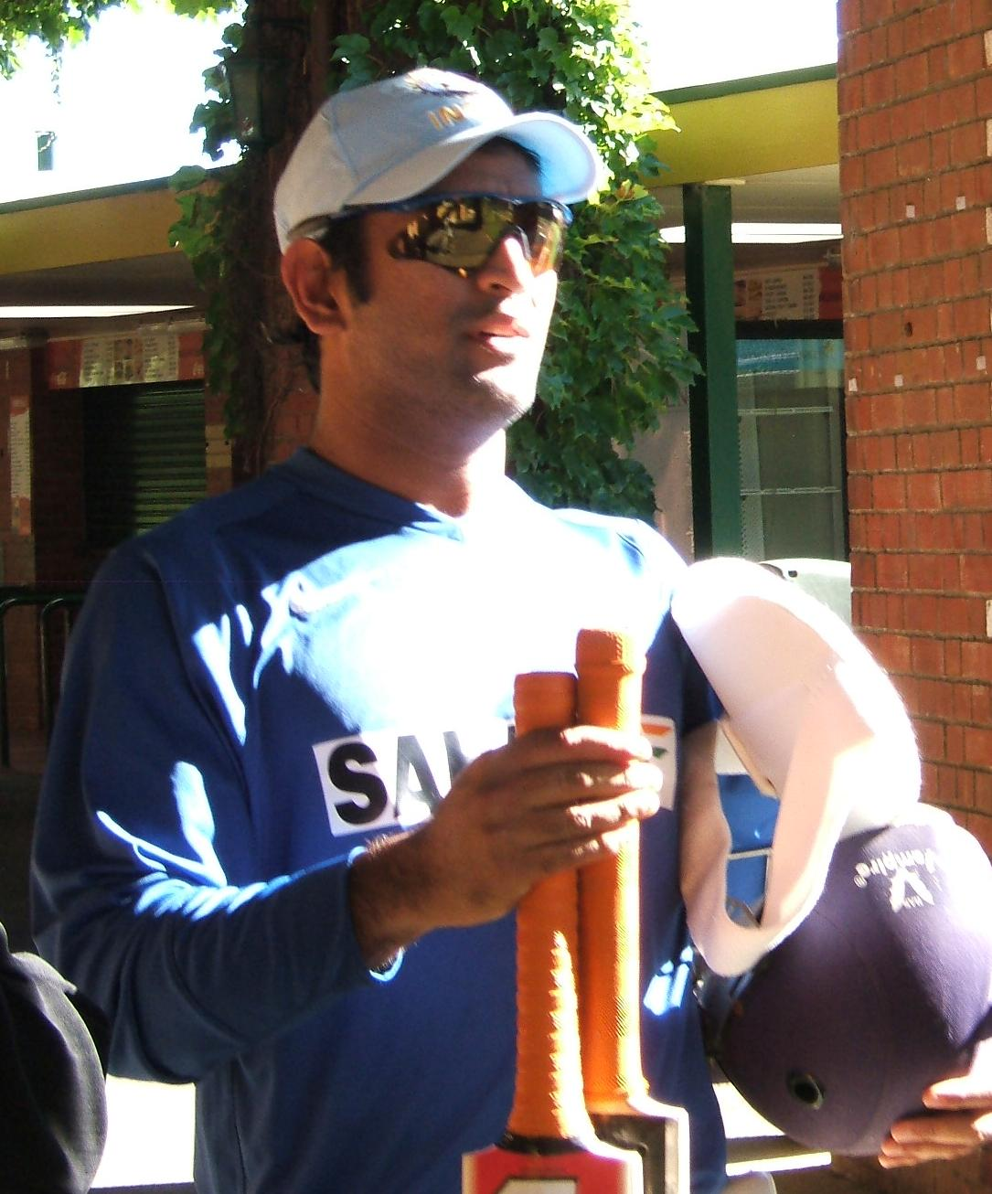 Mahendra Singh Dhoni at Adelaide Oval